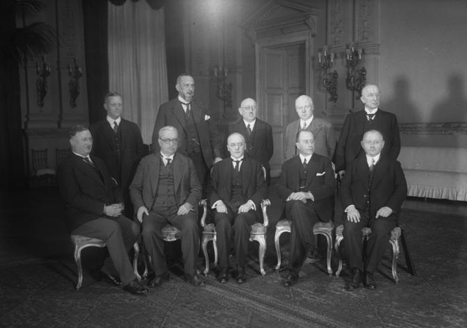 Das neue Reichskabinett Brüning bei seiner ersten Sitzung im Reichskanzlerpalais in der Wilhelmstrasse! sitzend v.li.n.re.: Reichsinnenminister Dr. Wirth (Zentrum), Reichswirtschaftsminister Dietrich (Demokrat), Reichskanzler Dr. Brüning (Zentrum), Reichsaussenminister Dr. Curtius (Dtsch. Volkspartei), Reichspostminister Dr. Schätzel (Bayer. Volkspartei) stehend v.li.n.re.: Reichsminister für die besetzten Gebiete Treviranus (Volks-Konservertive Vereinigung), Reichs-Justizminister Dr. Bredt (Wirtschaftspartei), Reichsarbeitsminister Dr. Stegerwald (Zentrum), Reichsfinanzminister Dr. Moldenhauer (Dtsch. Volkspartei), Reichsverkehrminister von Guerrard (Zentrum). Information added by Wikimedia users.Kabinett Brüning I 30. März 1930 – 10. Oktober 1931